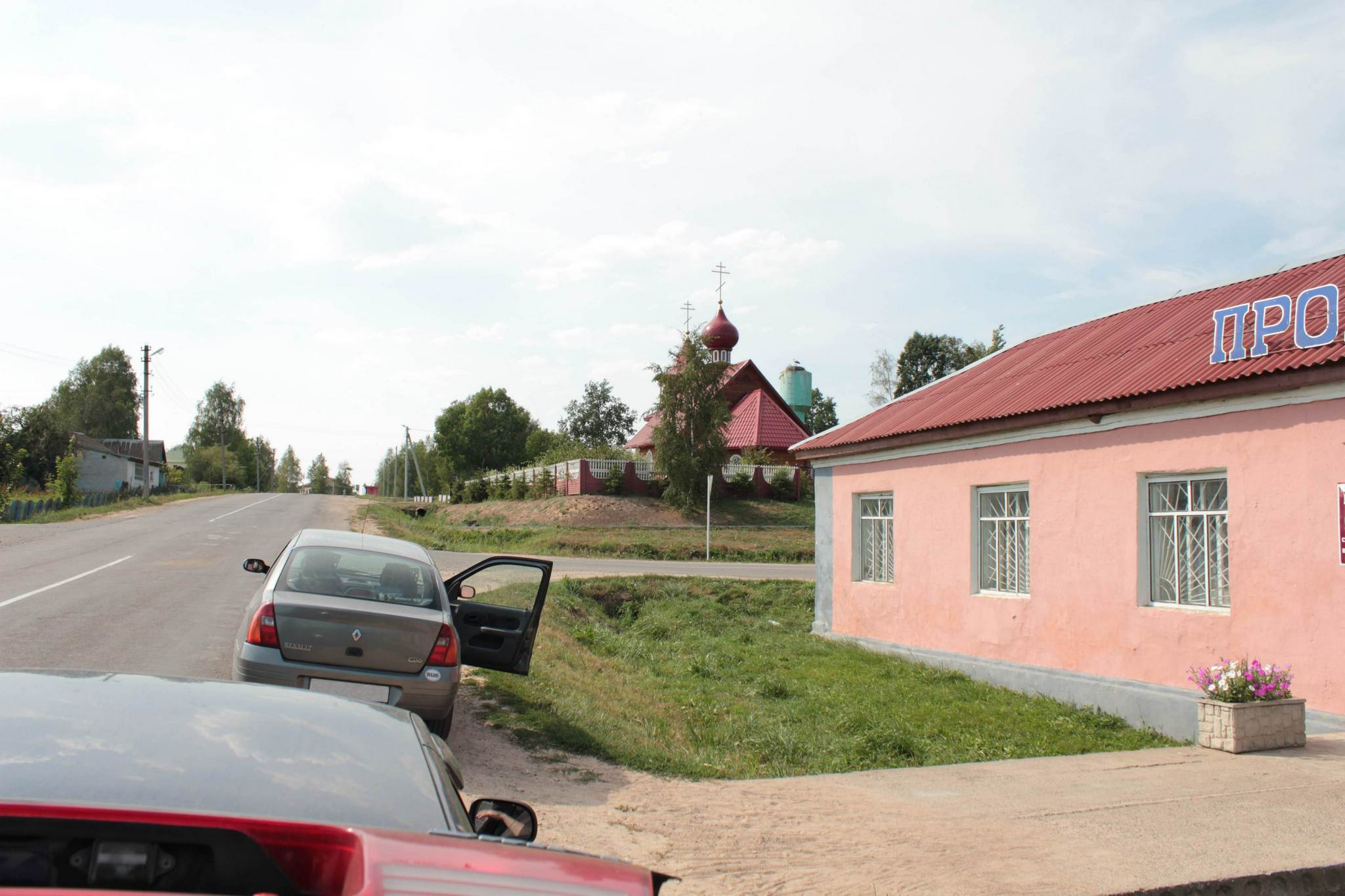 вид на деревню Ляды Витебской области